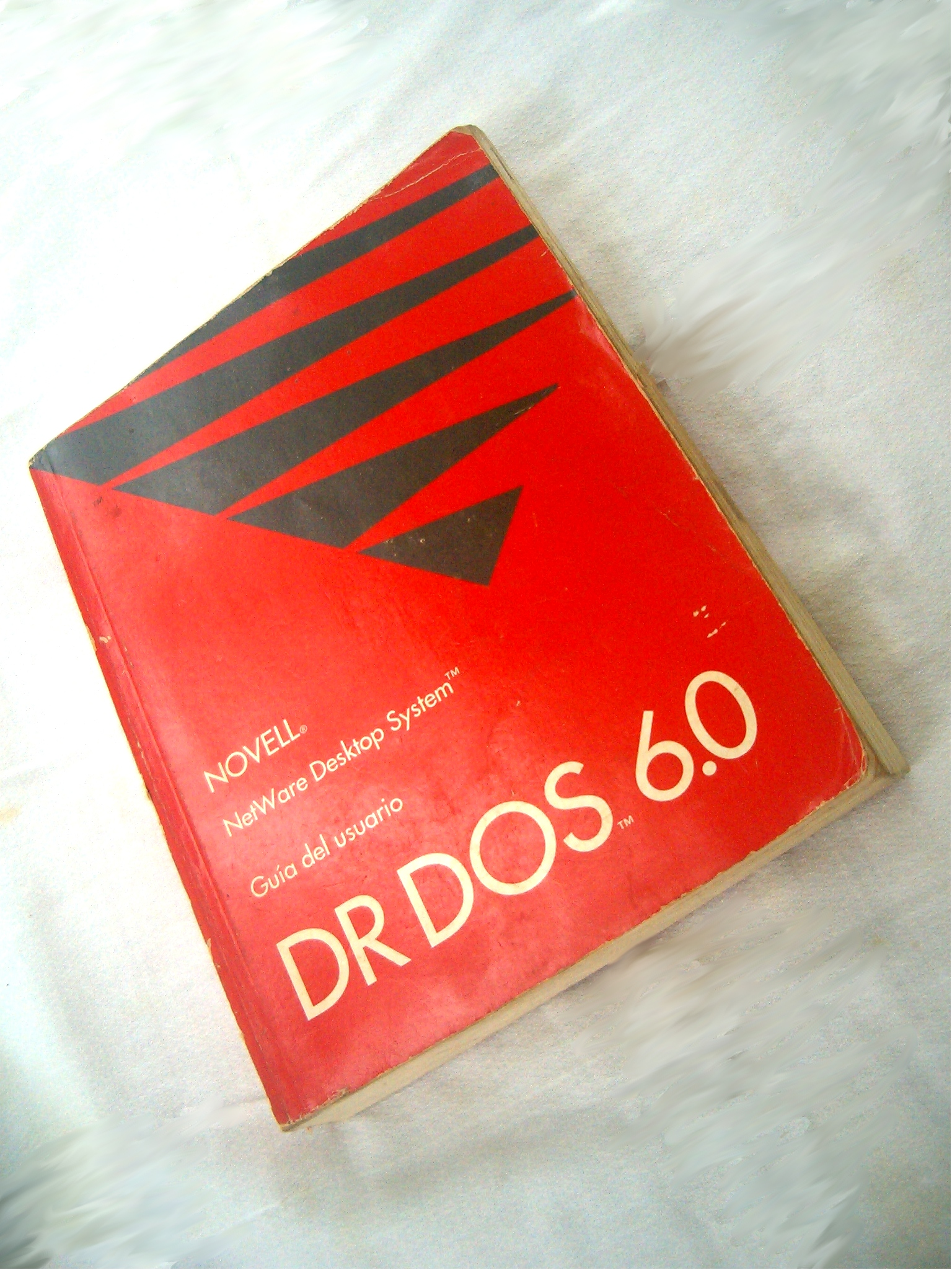 Manual del Usuario del DR-DOS 6.0